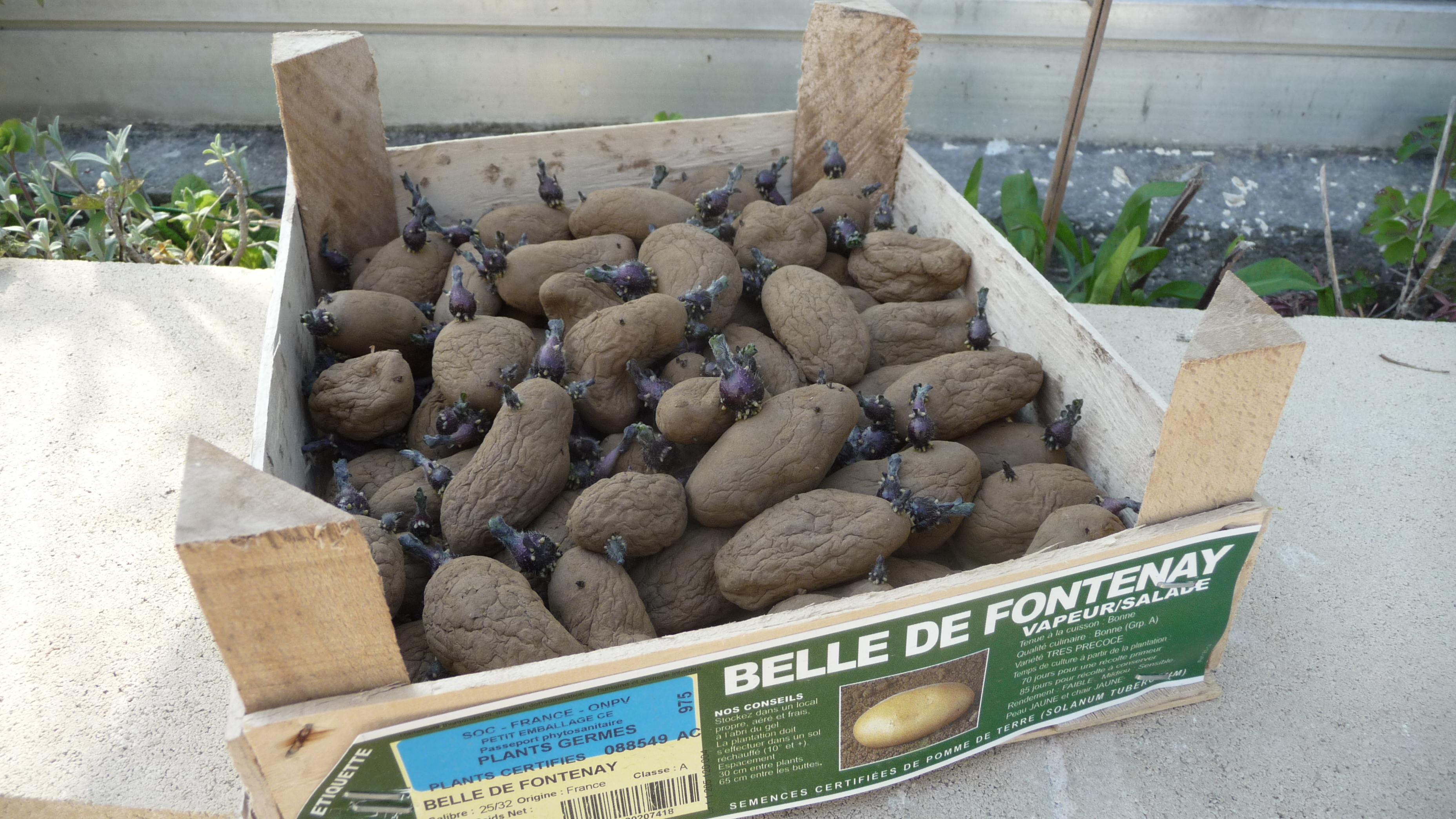 Caissette de plants germés de 'Belle de Fontenay', variété de pomme de terre (Solanum tuberosum)